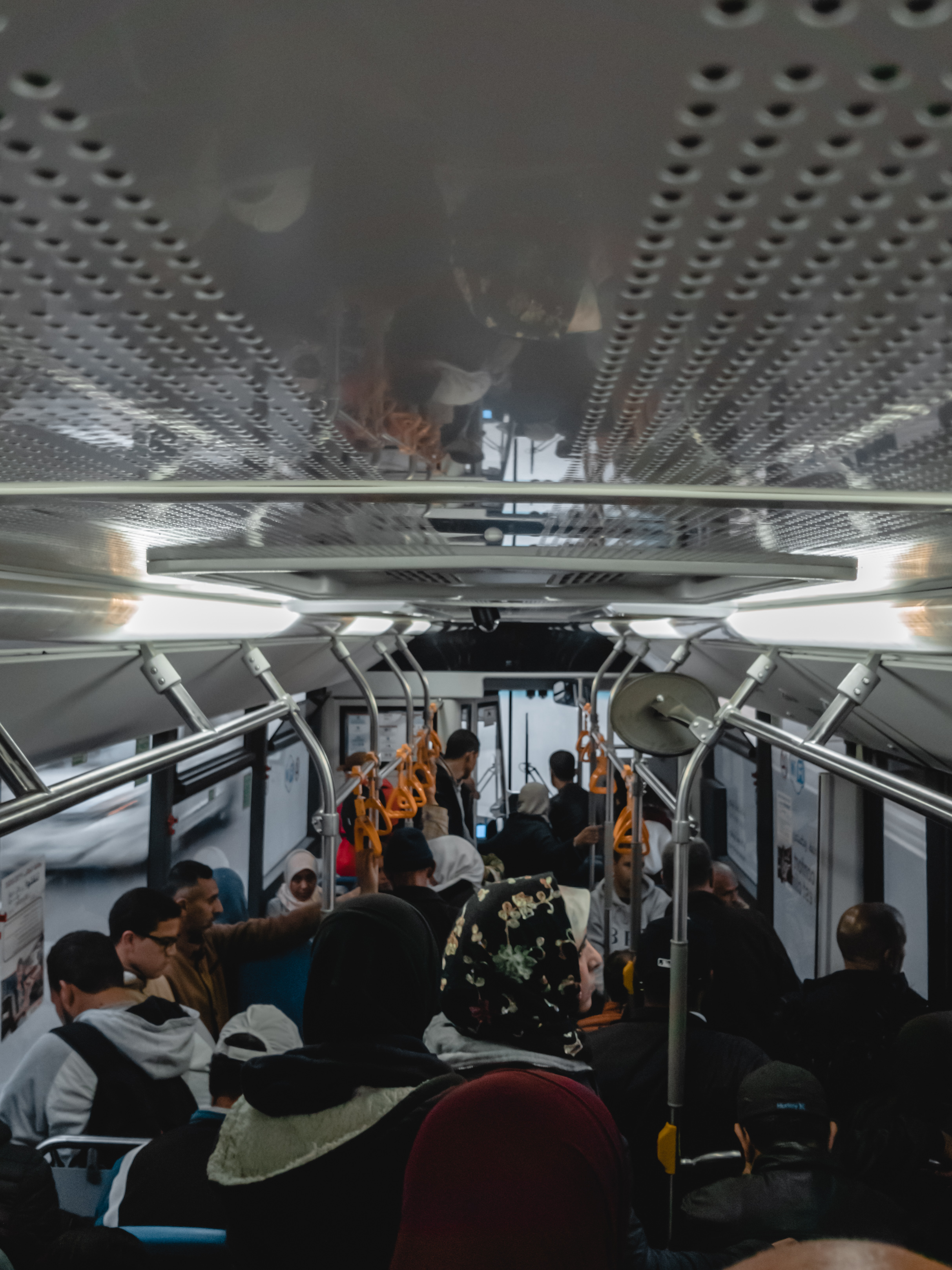 الحافلة إحدى وساءل النقل في جميع البلدان وداخلها تجد جميع شرائح المجتمع This is an image with the theme "Africa on the Move or Transport" from: Morocco